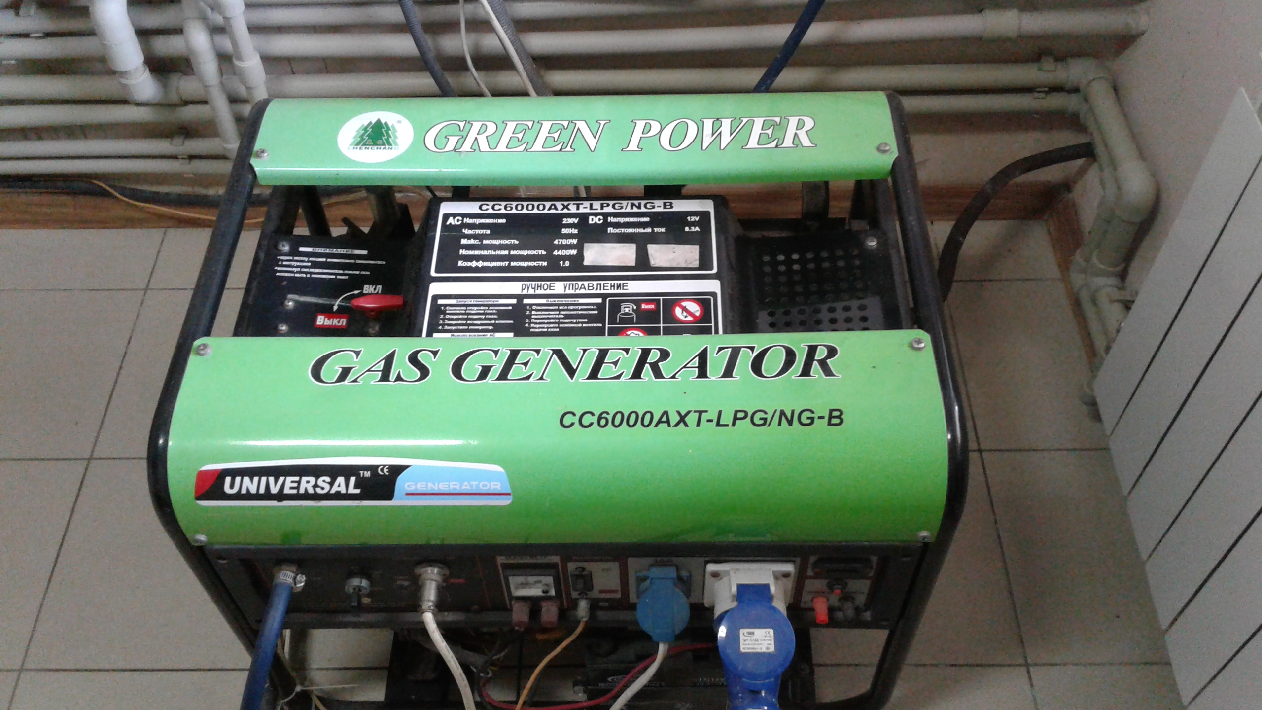 Пересувний генератор